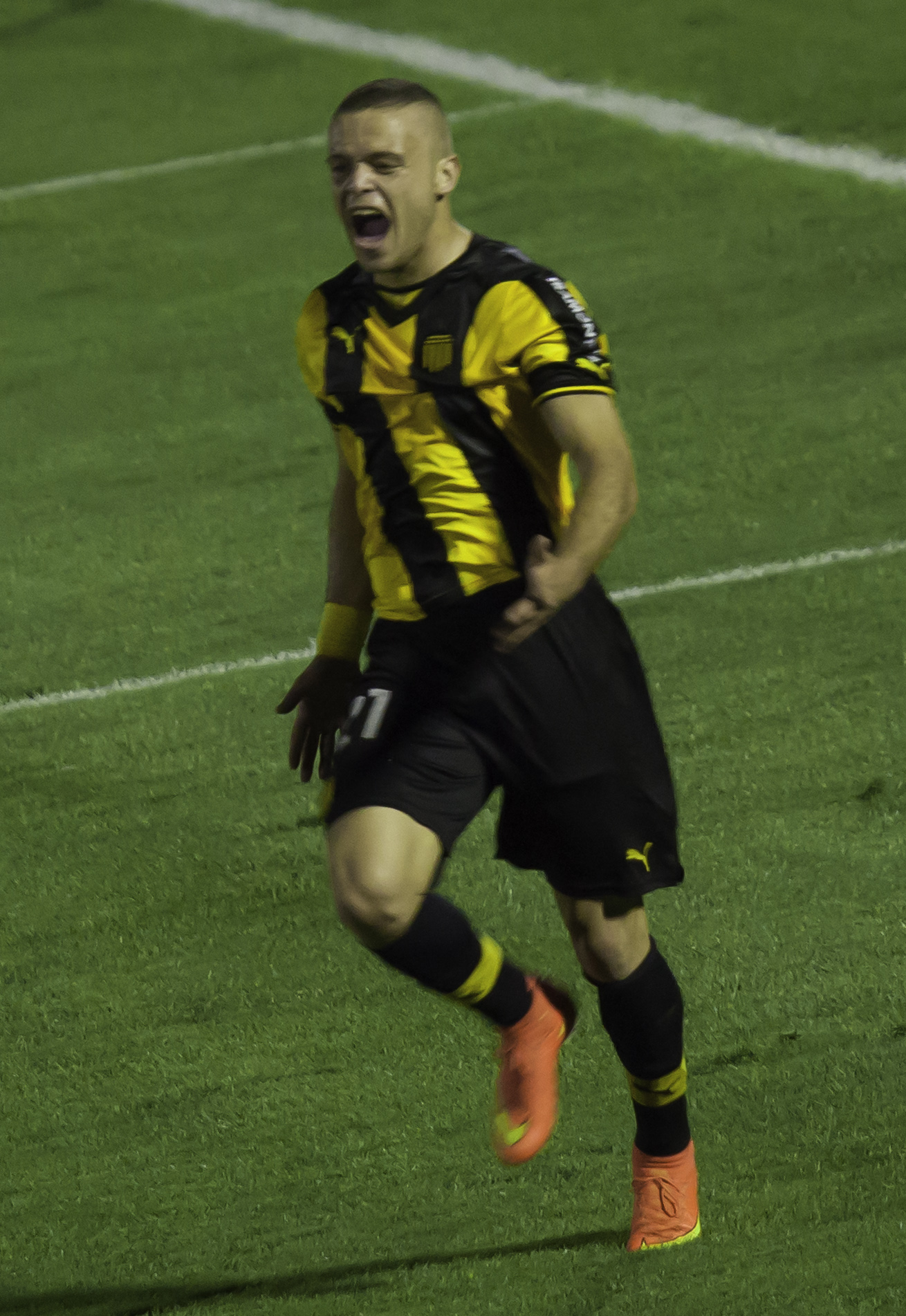 Peñarol 2 - Estudiantes de la Plata 1 Peñarol: Pablo Migliore; Darío Rodriguez, Carlos Valdez o Gonzalo Viera, Damián Macaluso; Alejandro Silva, Sebastián Píriz, Diogo Silvestre, Antonio Pacheco, Jorge Rodríguez; Jonathan Rodríguez y Marcelo Zalayeta. Director técnico: Jorge Fosatti. Estudiantes de La Plata: Hilario Navarro; Leonardo Jara, Jonathan Schunke, Leandro Desábato, Matías Aguirregaray; Carlos Auzqui, Gastón Gil Romero, Román Martínez, Joaquín Correa; Diego Vera y Guido Carrillo. Director técnico: Mauricio Pellegrino. Árbitro: Leandro Vuaden (BRA), asistido por sus compatriotas Cleriston Barreto y Fabricio Vilarinho. Estadio Centenario, Montevideo, Uruguay Camera: Canon EOS 5D Mark II 6 ISO: 2500